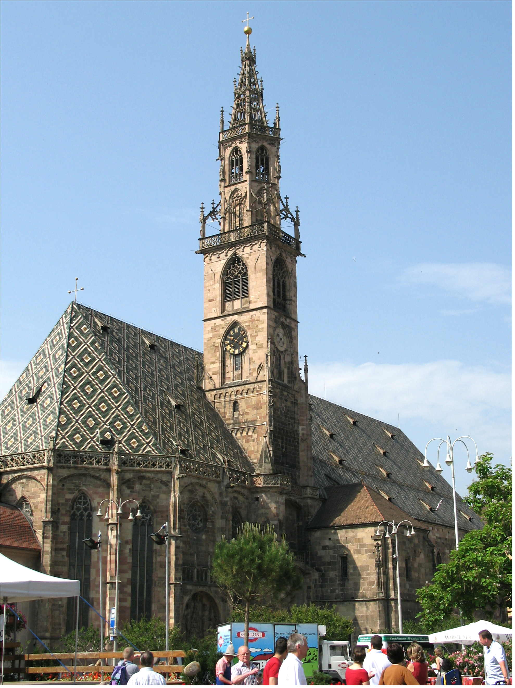 Sujet : Doum zu Bozen (Bolzano) Lizenz